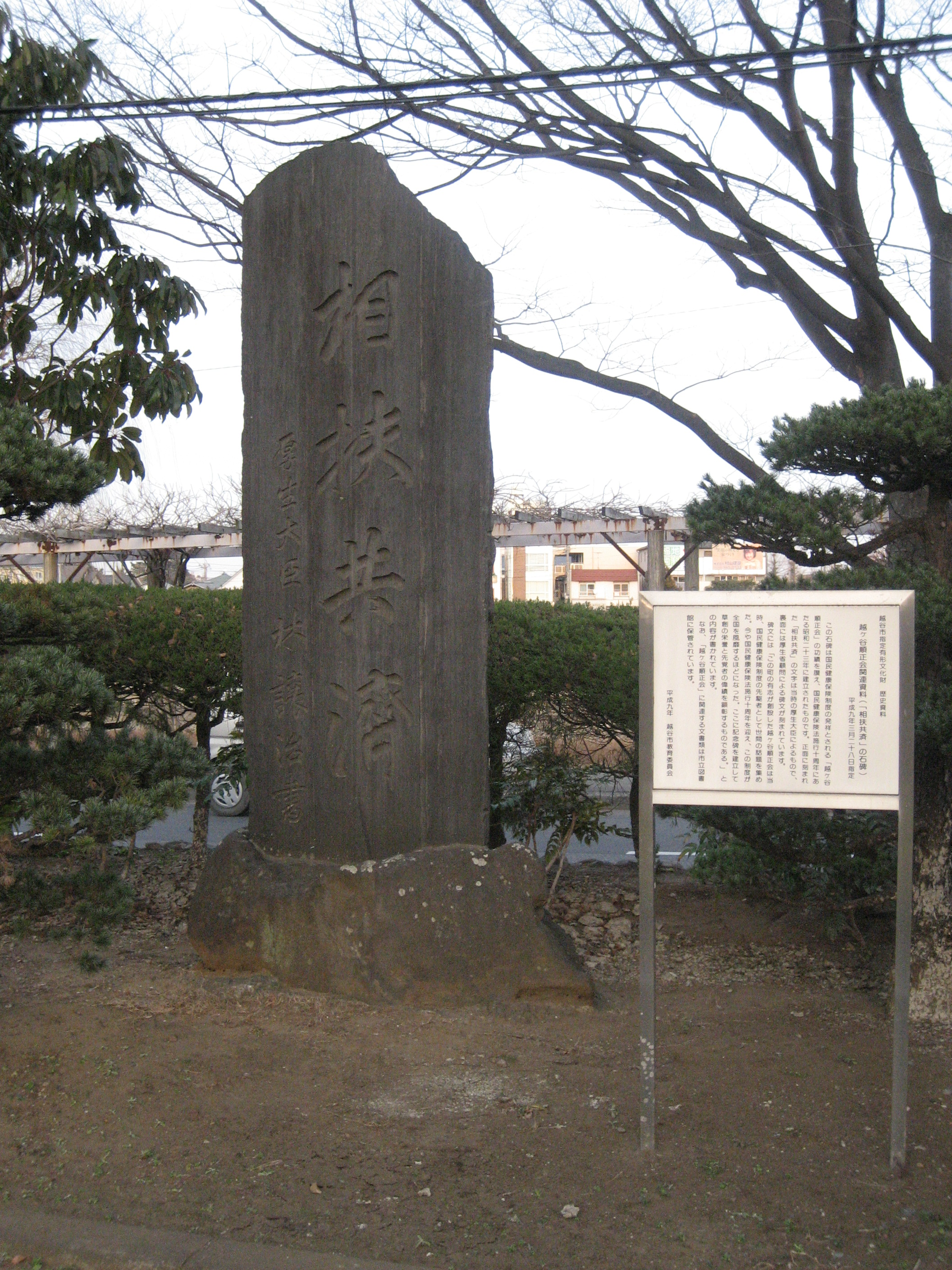 国民健康保険発祥の地の碑（越谷市役所敷地内）